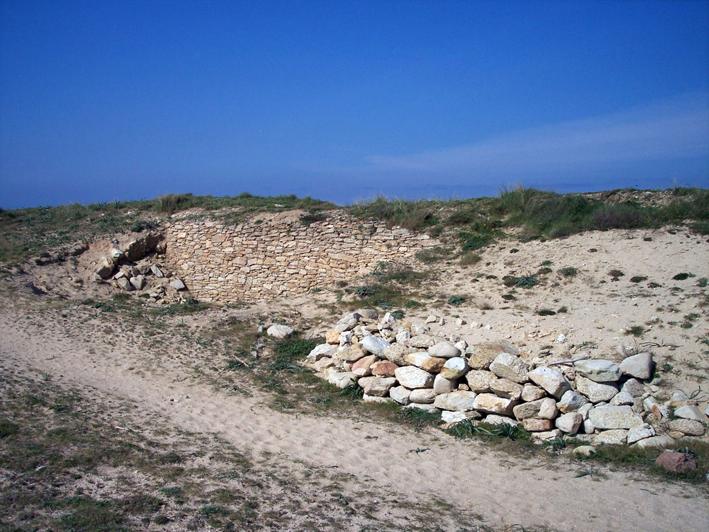 Castro do Porto de Baixo (Carreira)